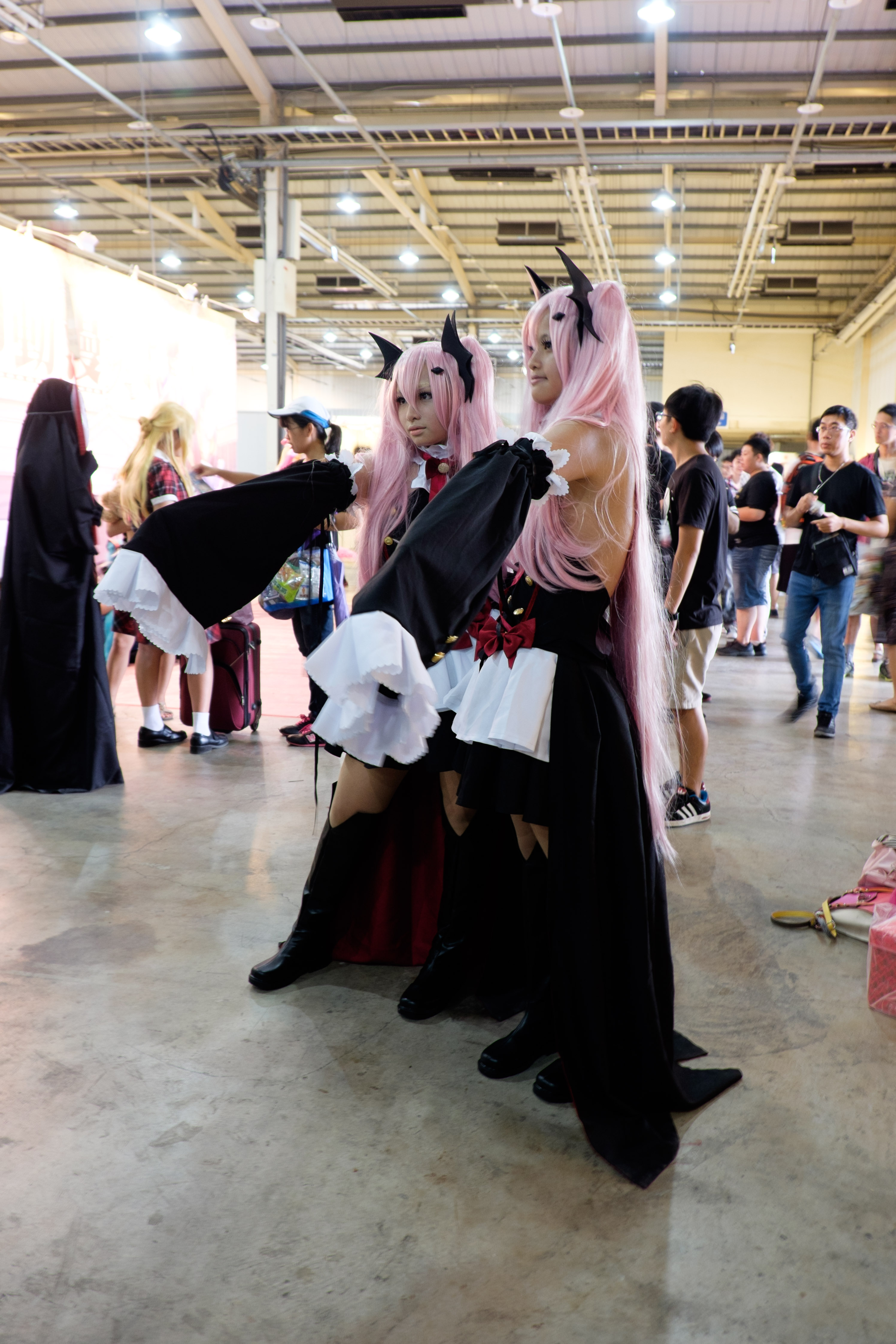 2015臺中動．漫．力第一日上午場內，＜終わりのセラフ＞クルル・ツェペシCosplayers。